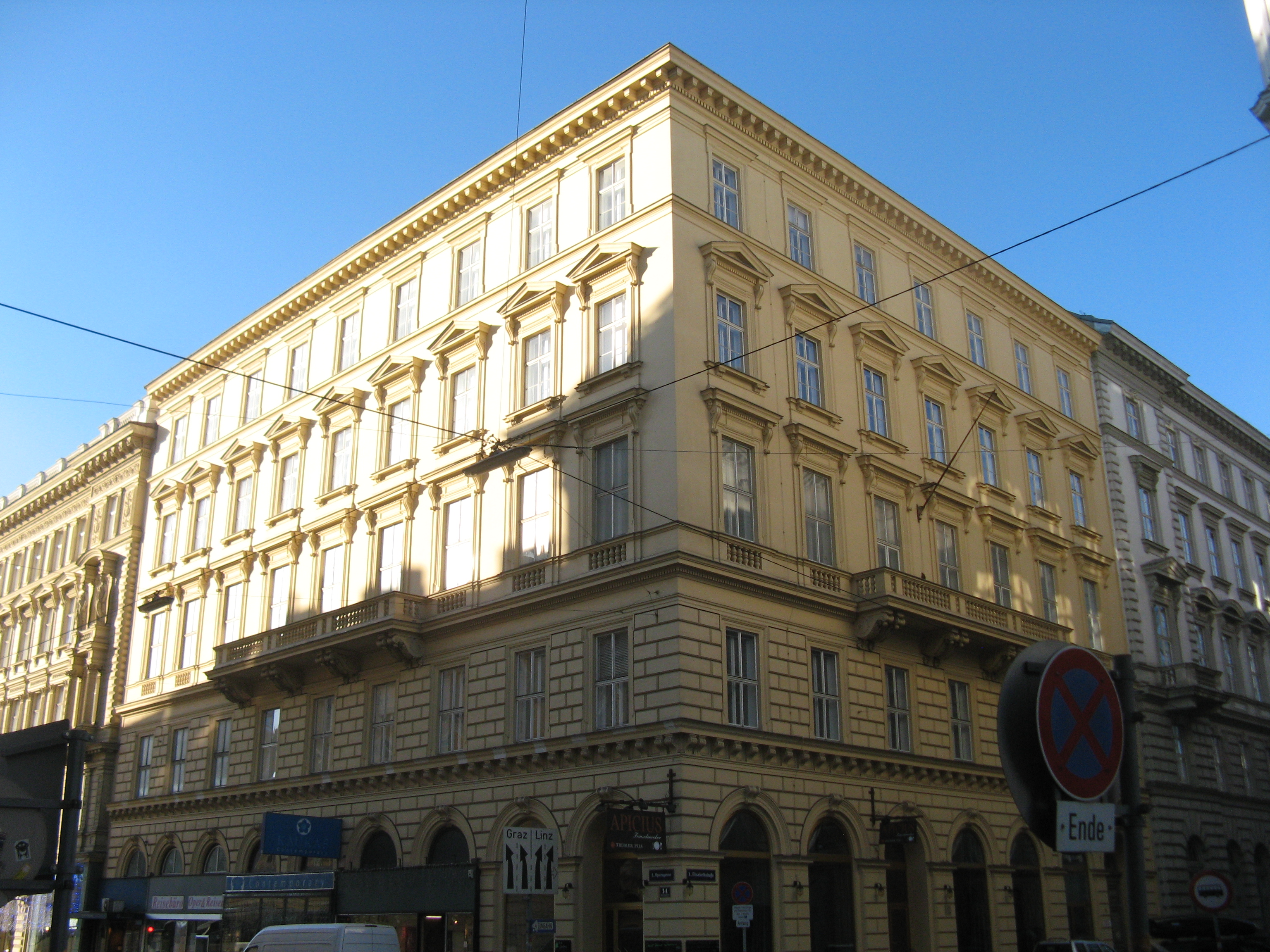 Eckhaus (1871-72), Elisabethstraße 7, von Johann Romano und August Schwendenwein, Wien-Innere Stadt